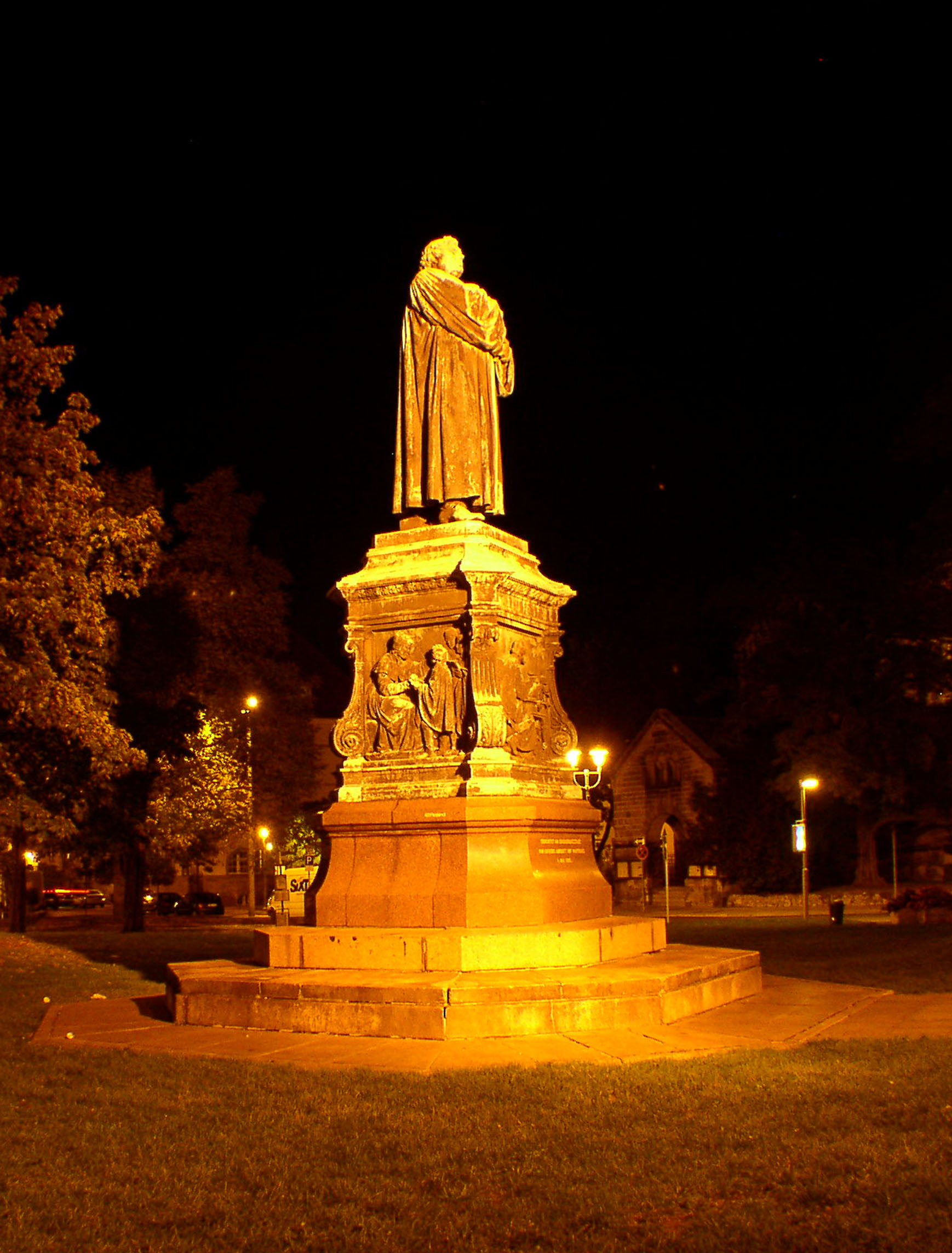 Lutherdenkmal Eisenach nachts